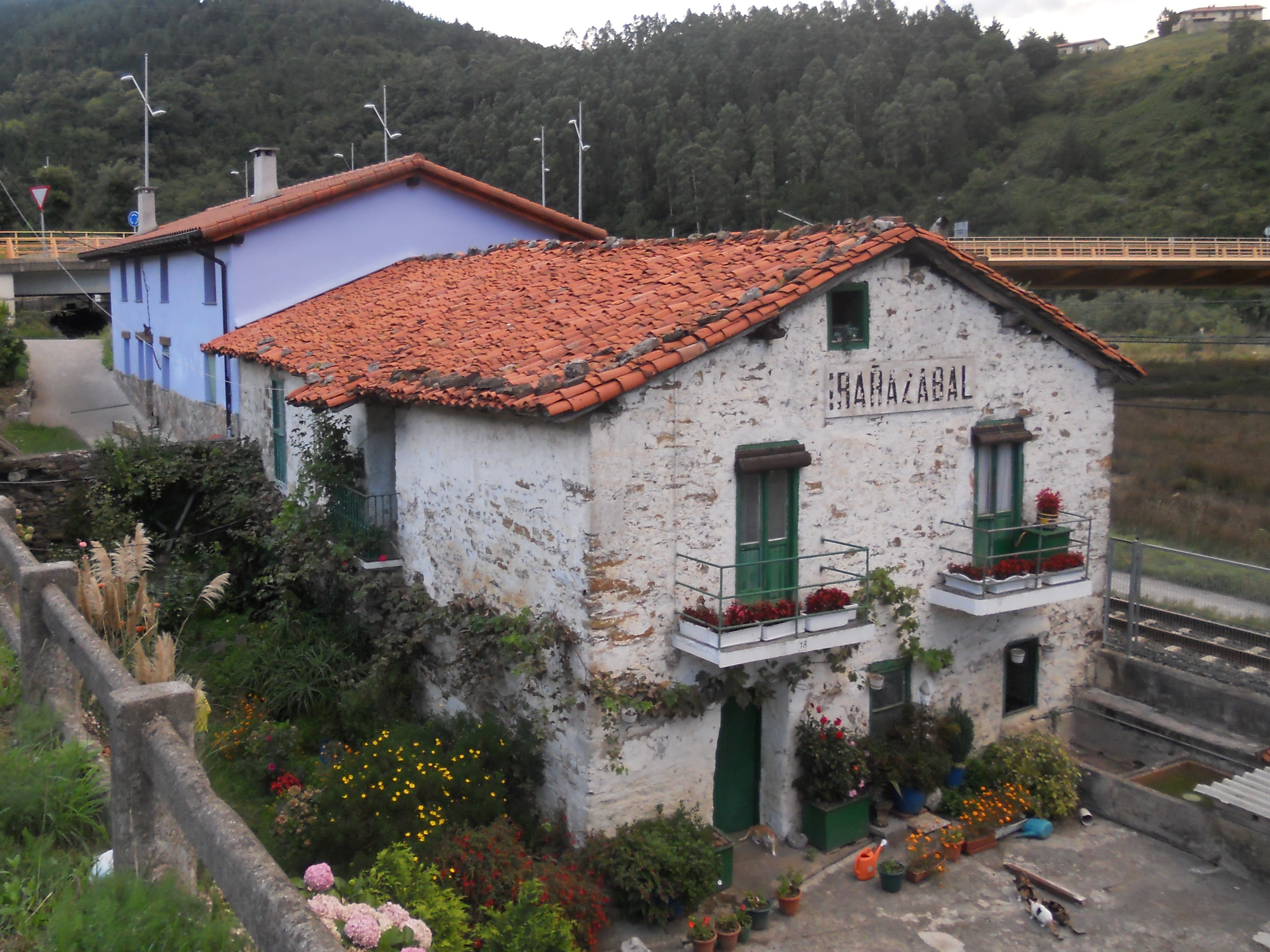 Irarrazabal baserria, Debako sarreran.